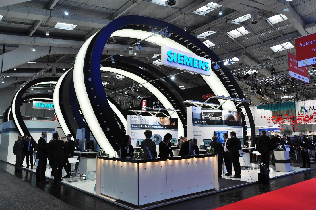 Hannover-Messe 2014 VW